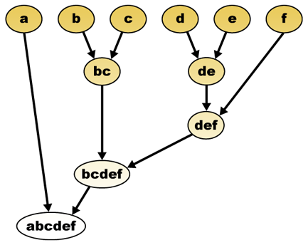 Diagrama de agrupación jerárquica Simple graph for hierarchical clustering. Created by me ( Stathis Sideris) on 10/02/2005